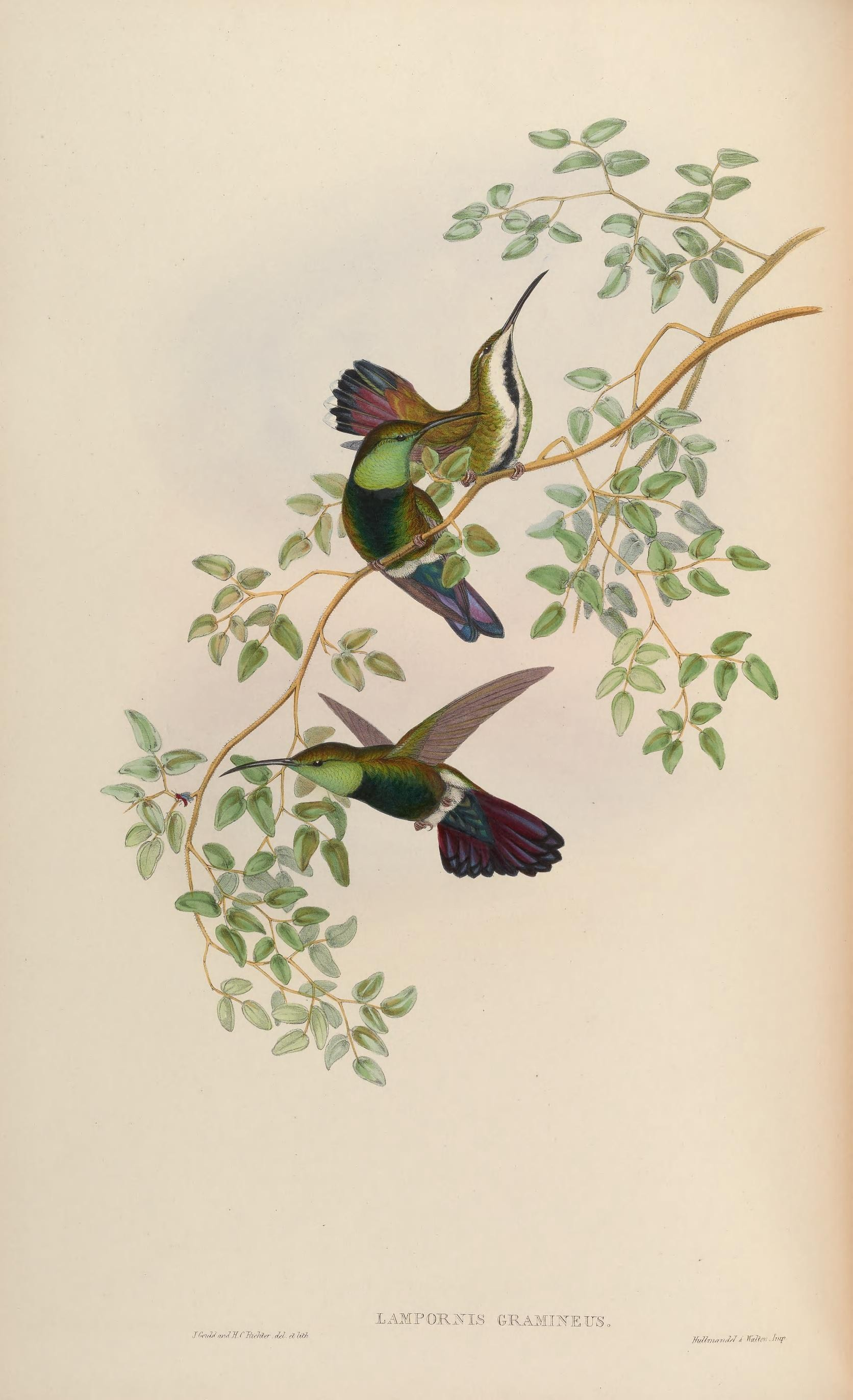 c**^^ XAMP0R2^^IS GR.AMJKEFS J ^Vf^/^ .m^ 7fy Tvirlxf-'^r . del. el Ji^ JfuU77un.r^^7 4 Wrr^'^ ■ I^f^f